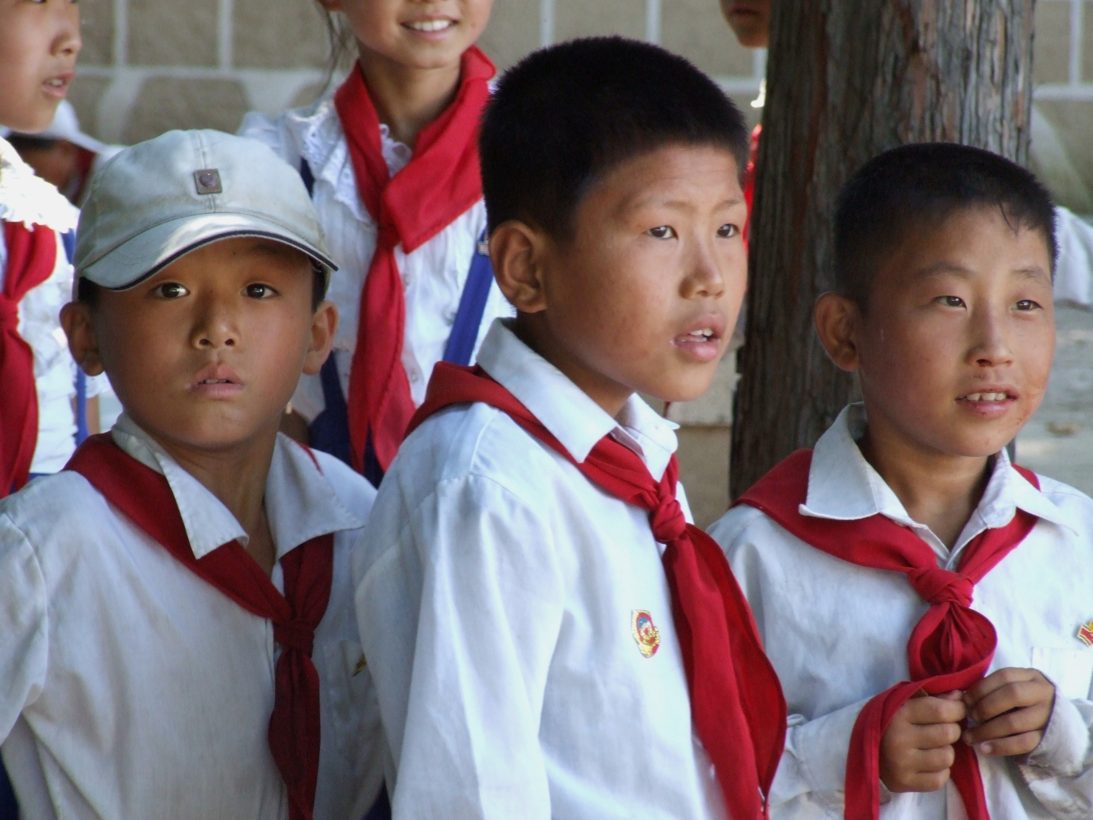 Schulkinder in Kaesong, Nordkorea